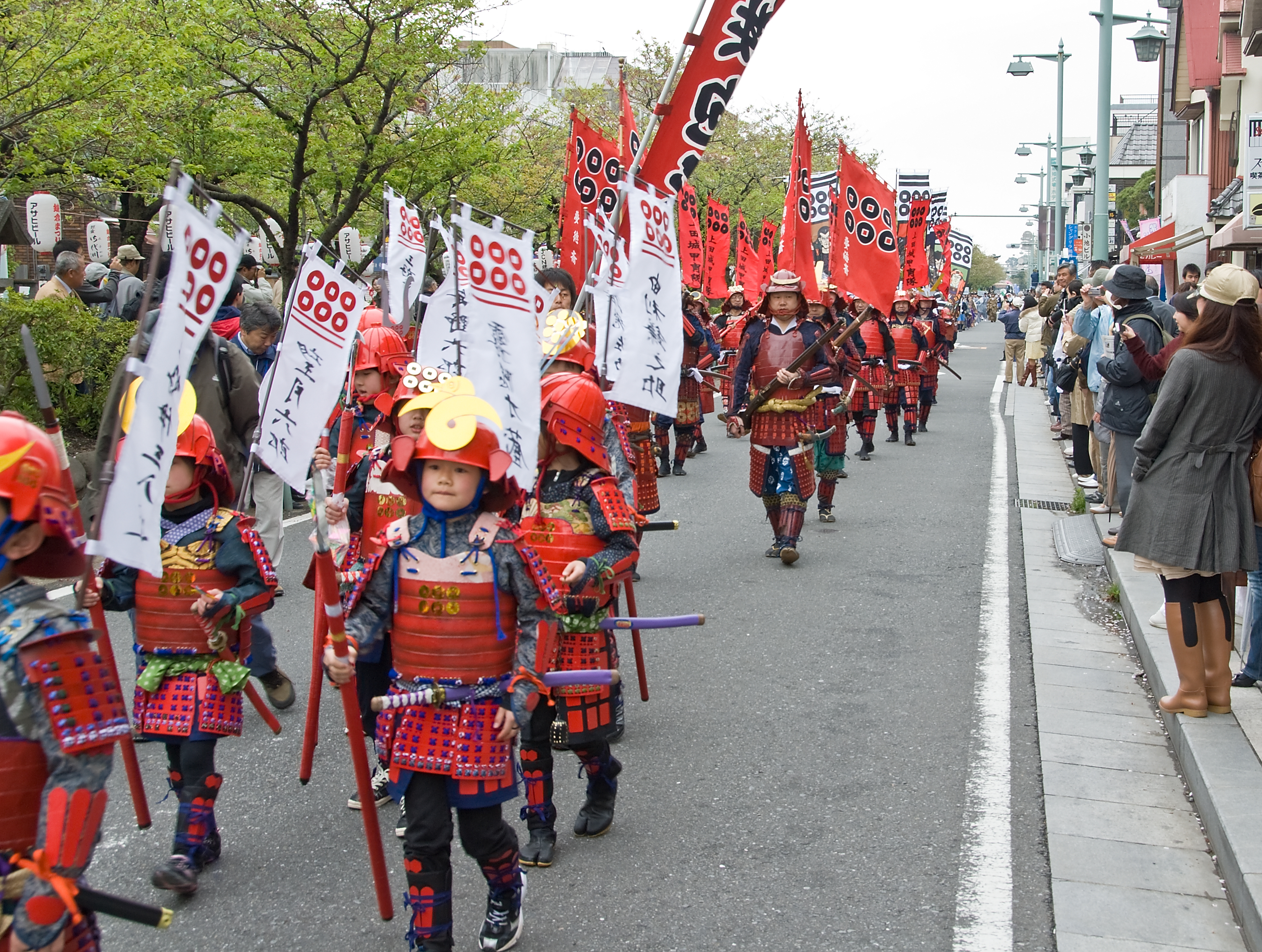 Young Samurai at the Kamakura Matsuri